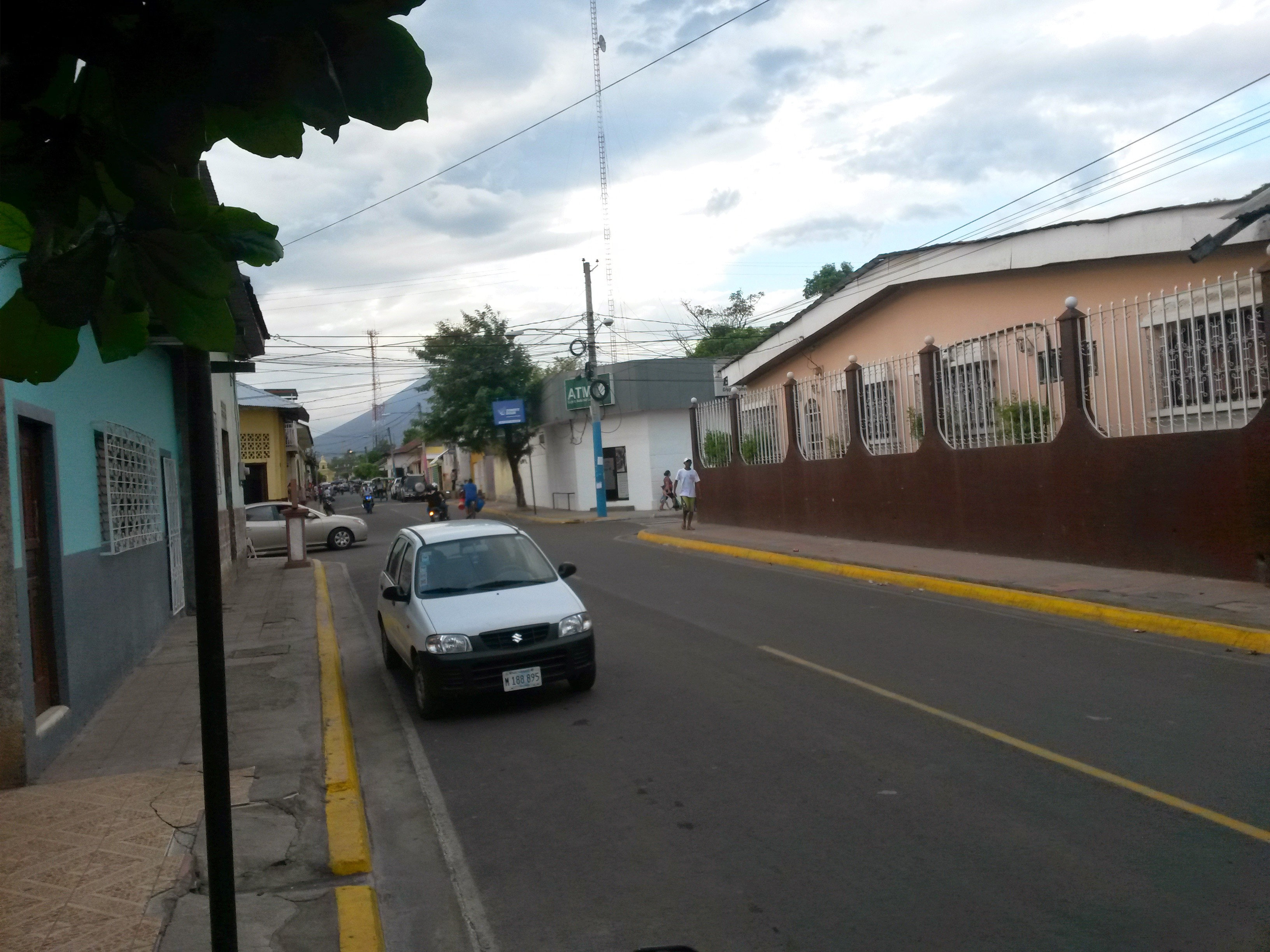 Avenida Al Calvario Calle 2 Direcion Norte